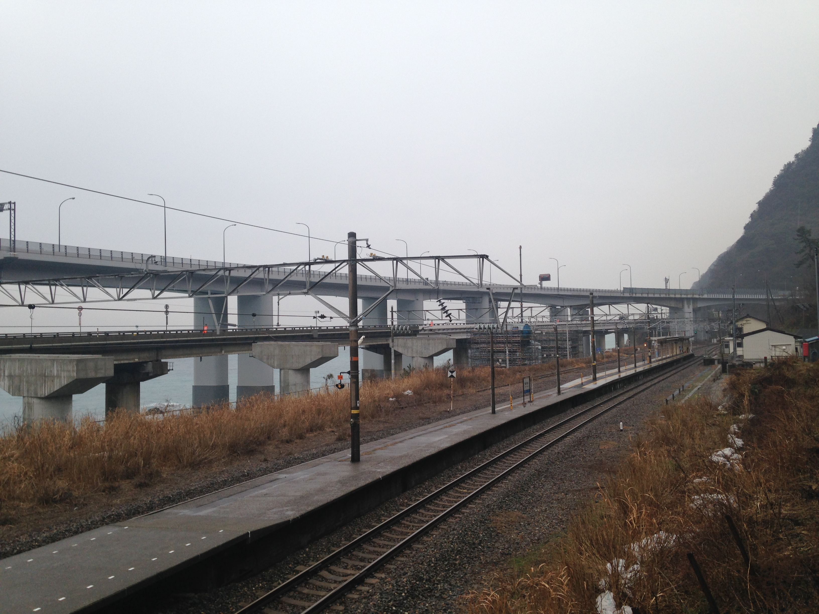 親不知駅ホームの遠景(青海方面)